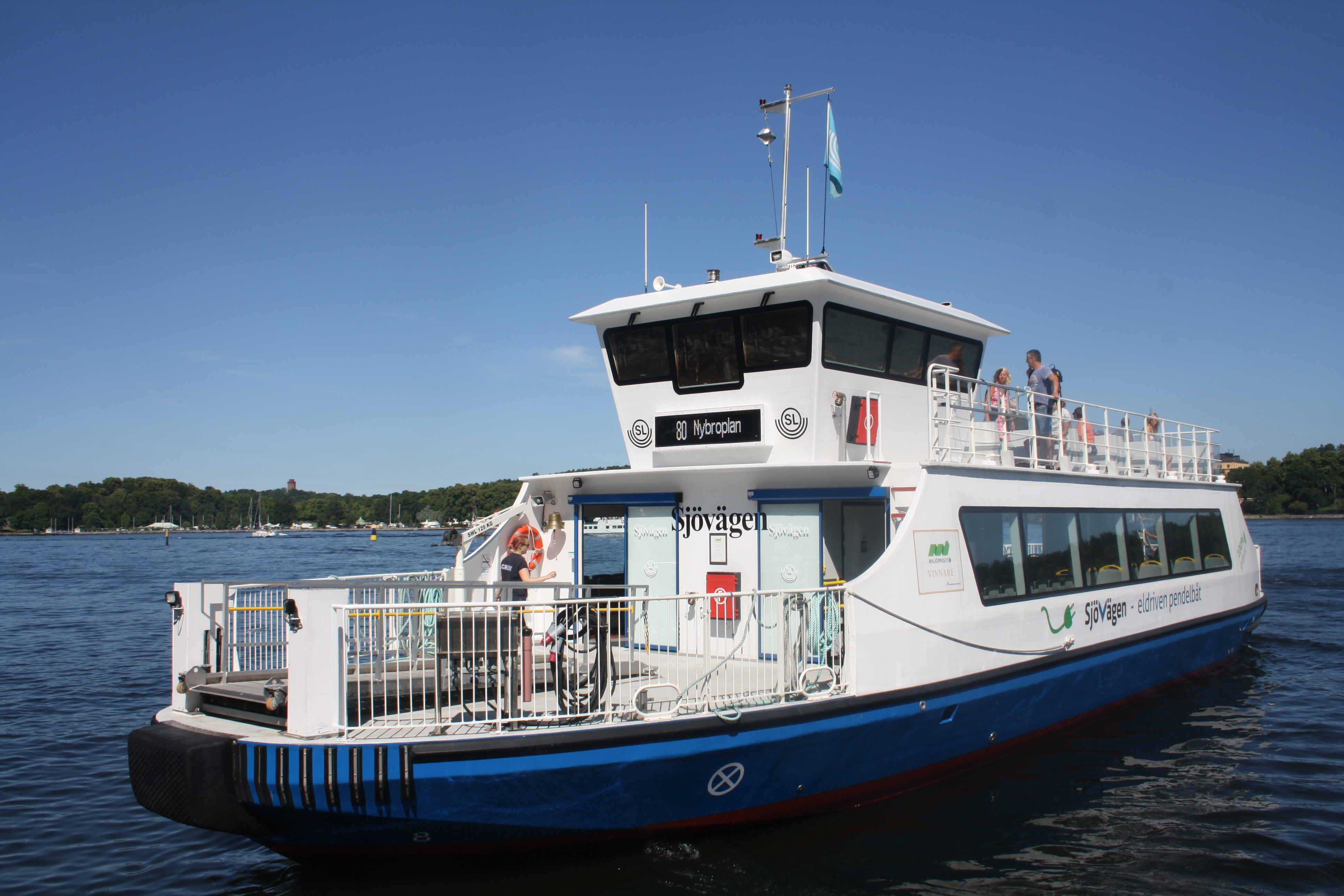 Sjövägen lämnar Kvarneholmen